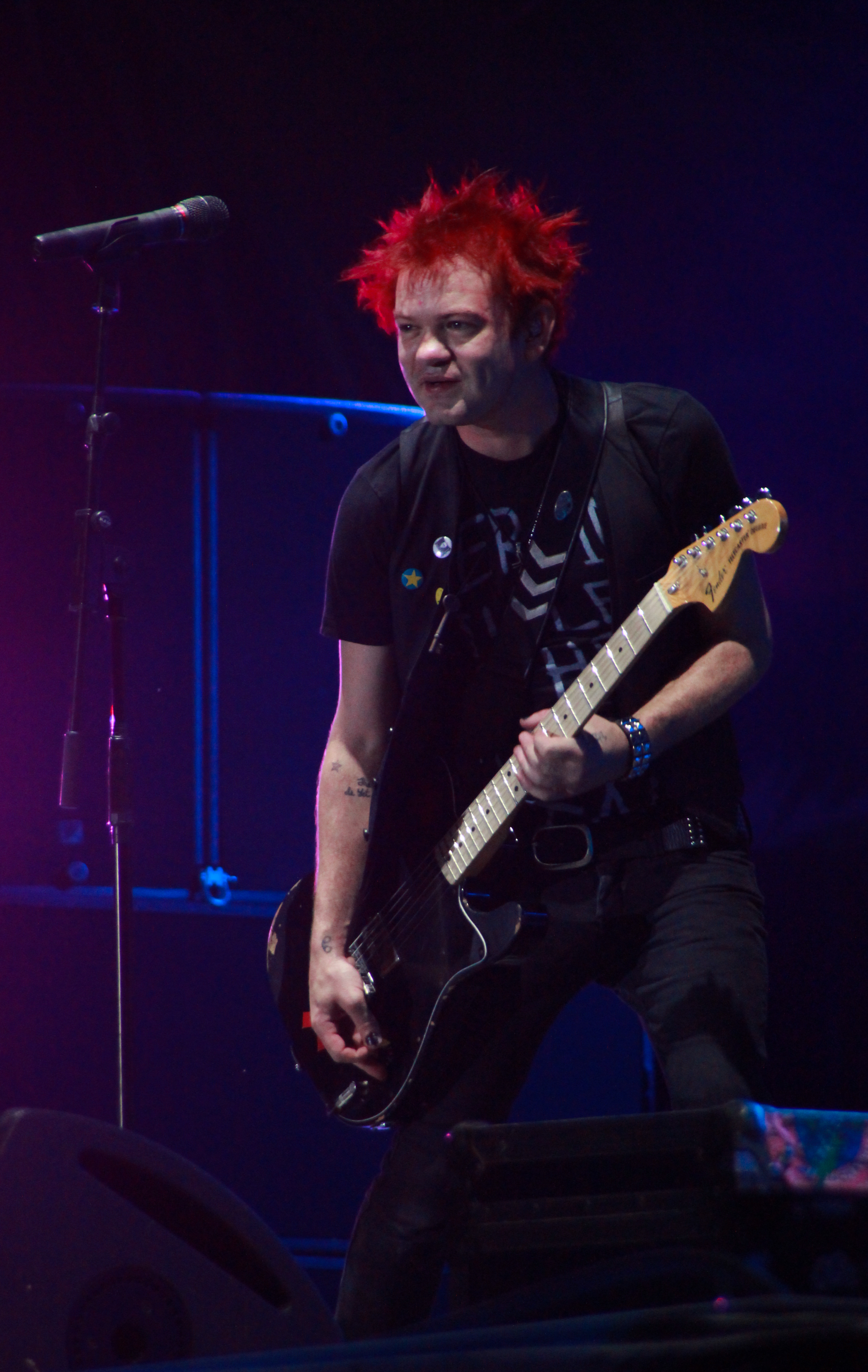 Sum 41 на фестивале Kubana 2012